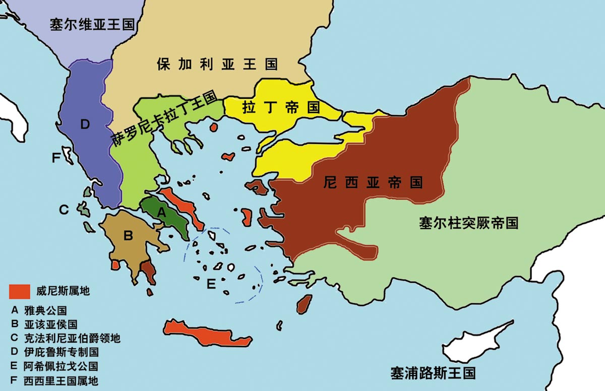 1205年前后的拜占廷帝国（尼西亚帝国）疆域. 公元1205年时的拜占庭帝国（尼西亚帝国）疆域.